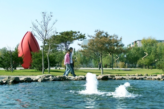 雷锋公园